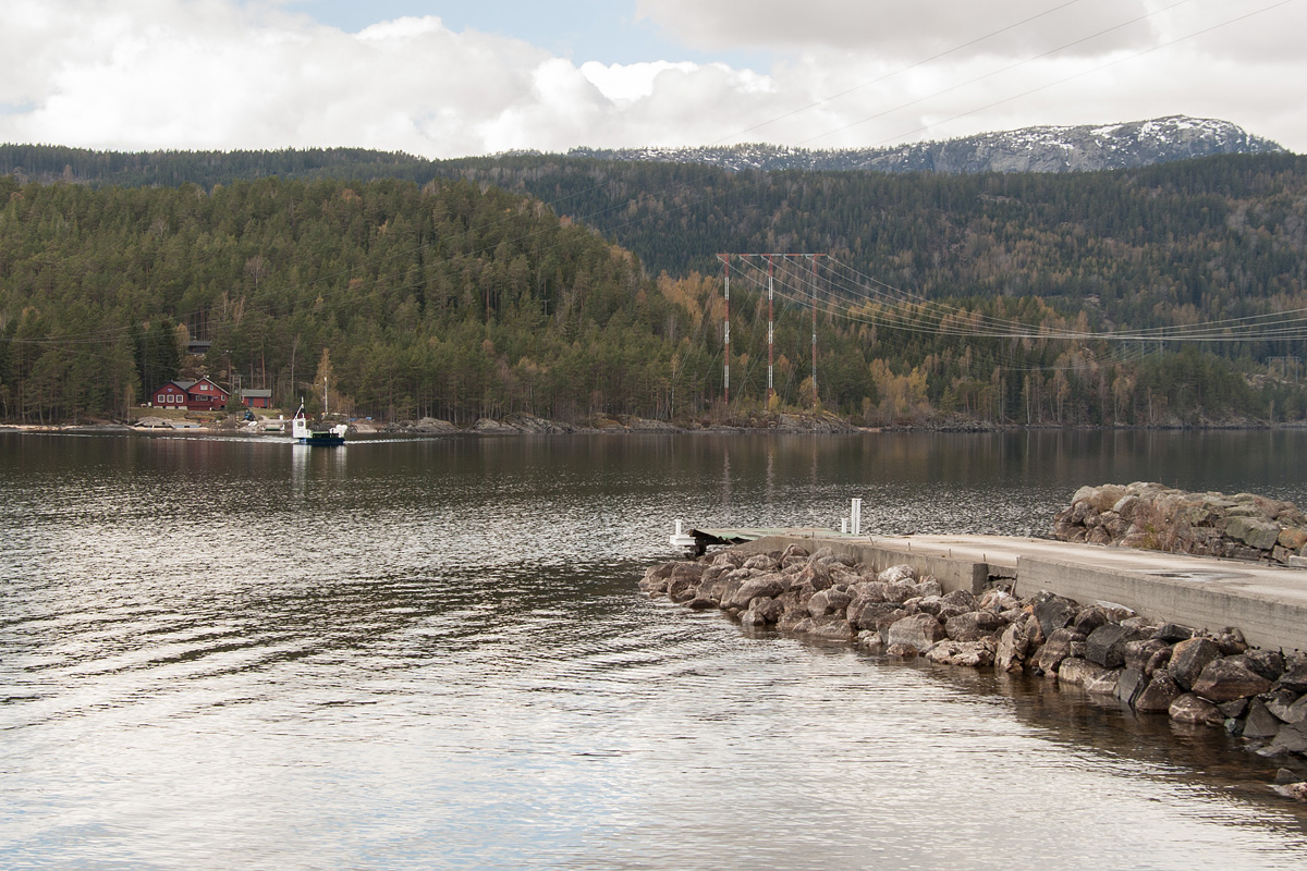 MF «Nissen» på vei fra Fjone mot Sundsodden.